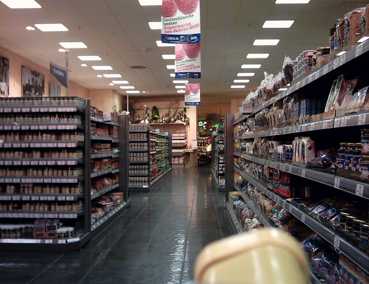 Innenansicht des Scheck-in Centers in Karlsruhe, Deutschlands Supermarkt des Jahres 2003.